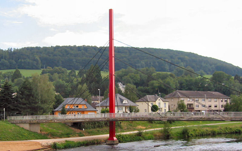 Schréiseelbréck fir Foussgänger zu Dikrech